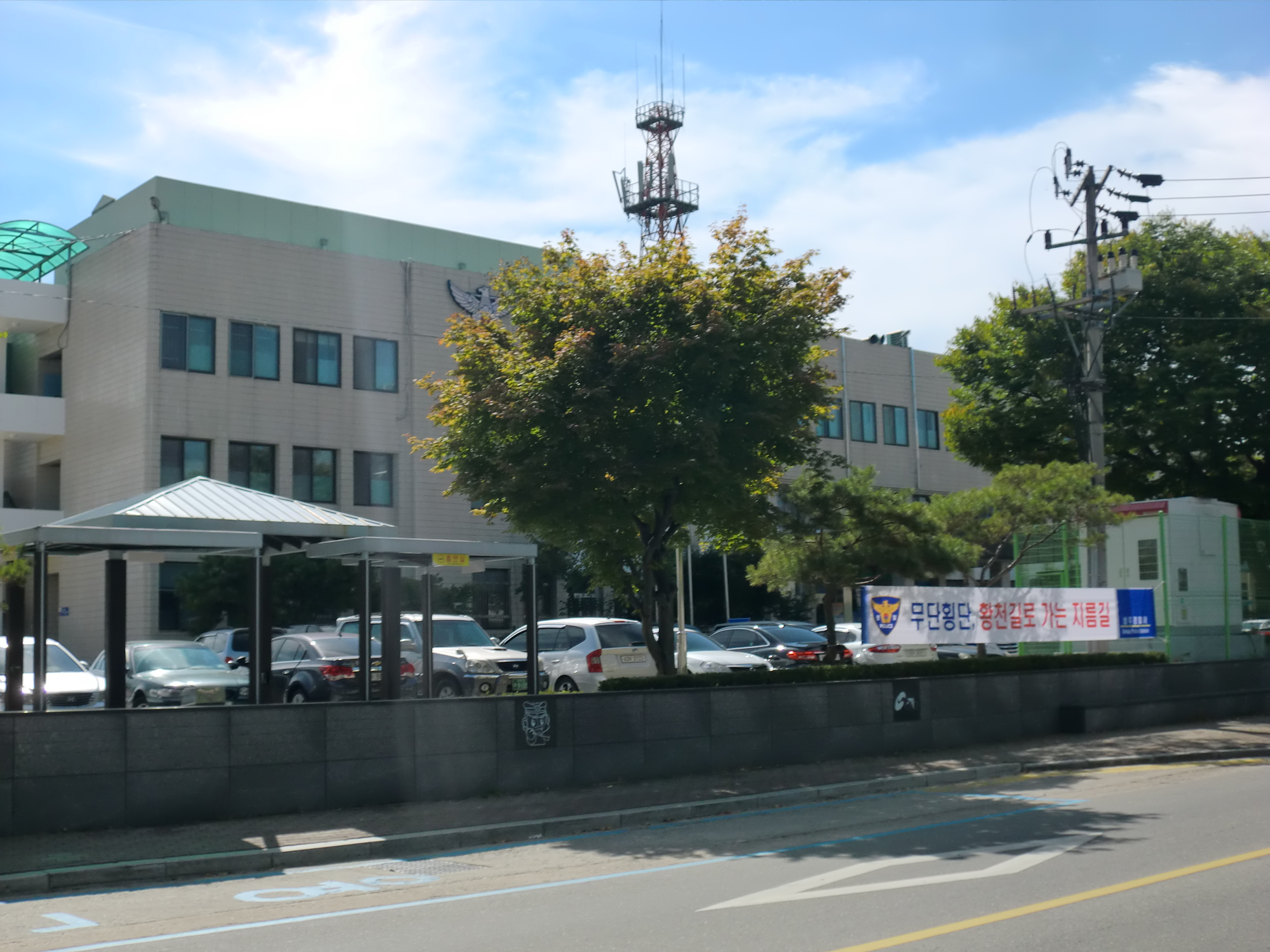 경상북도 상주시에 있는 상주경찰서